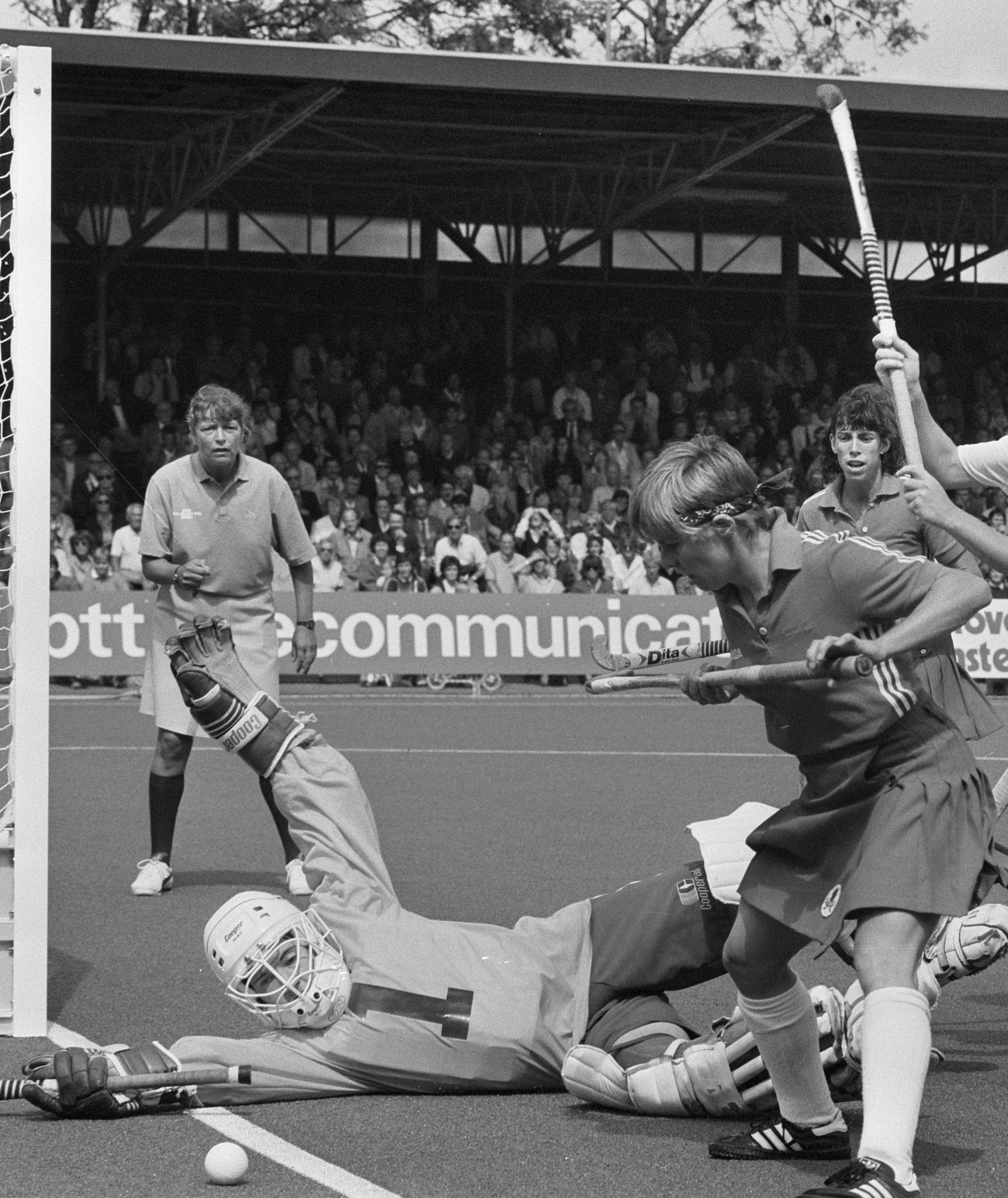 Wereldkampioenschappen hockey dames: Nederland-Canada; Marjan Eijsvogel (r) mist doel van keeper Sharon Bayes (l)